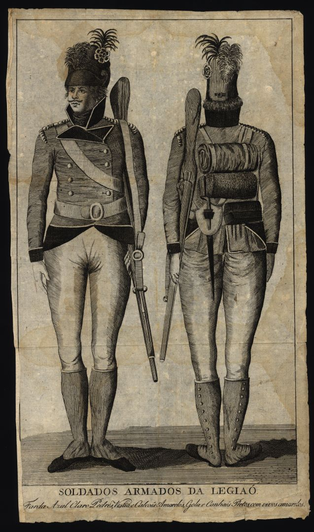 Farda da Legião Portuguesa sob o comando do Marquês de Alorna desde 1795